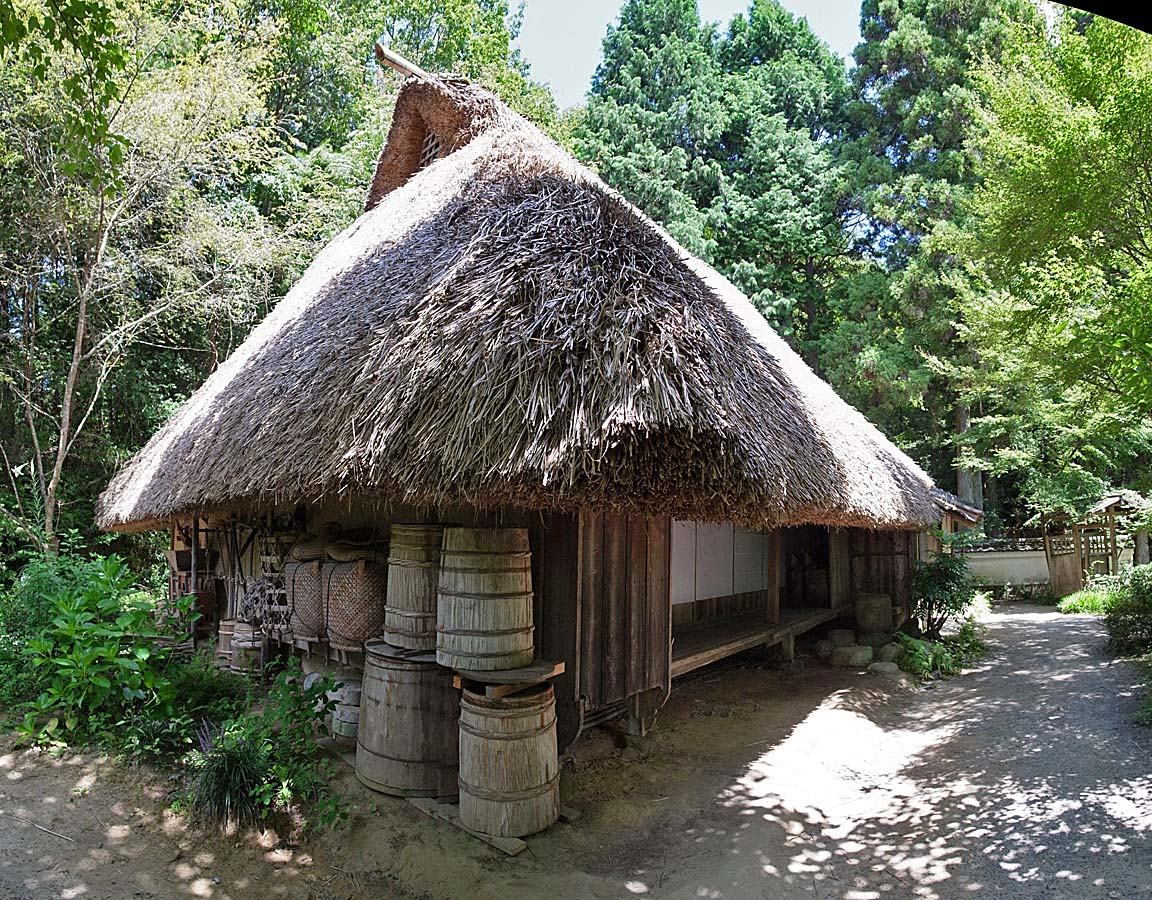 Koga-no-sato Ninja village , 甲賀の里 忍術村